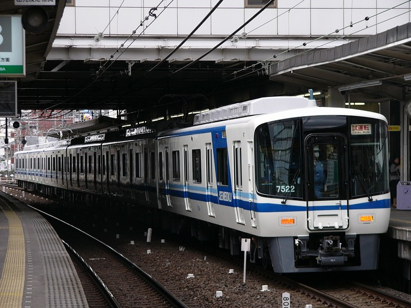 大阪府都市開発7020系電車